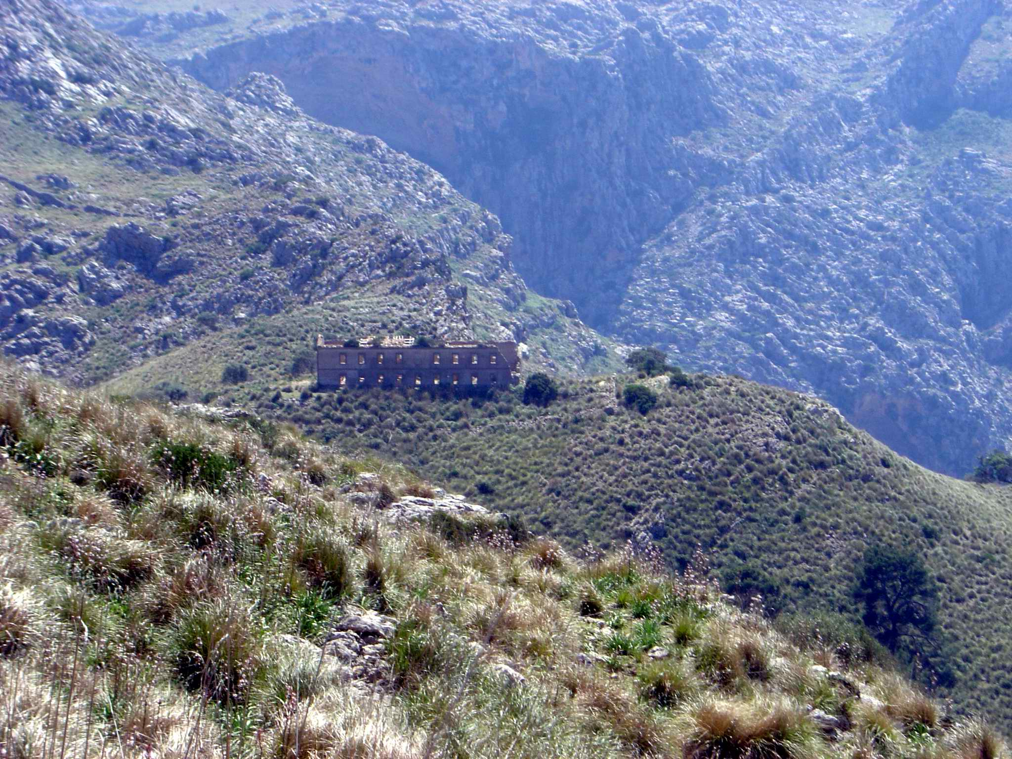 Quarter dels Carrabiners, al peu del Puig Roig. Escorca. Mallorca.